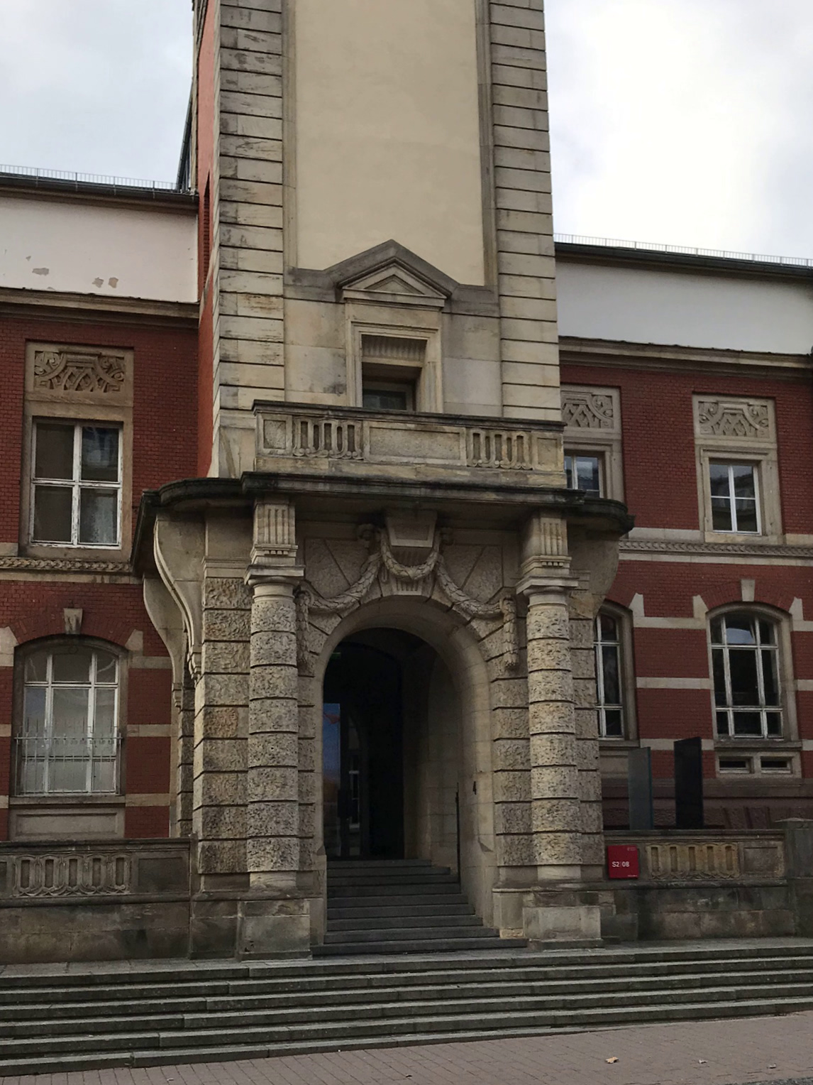 Eingang Chemie der TH Darmstadt mit Hörsaal für Vorlesungen über Programmieren (Ende der 1950er Jahre)